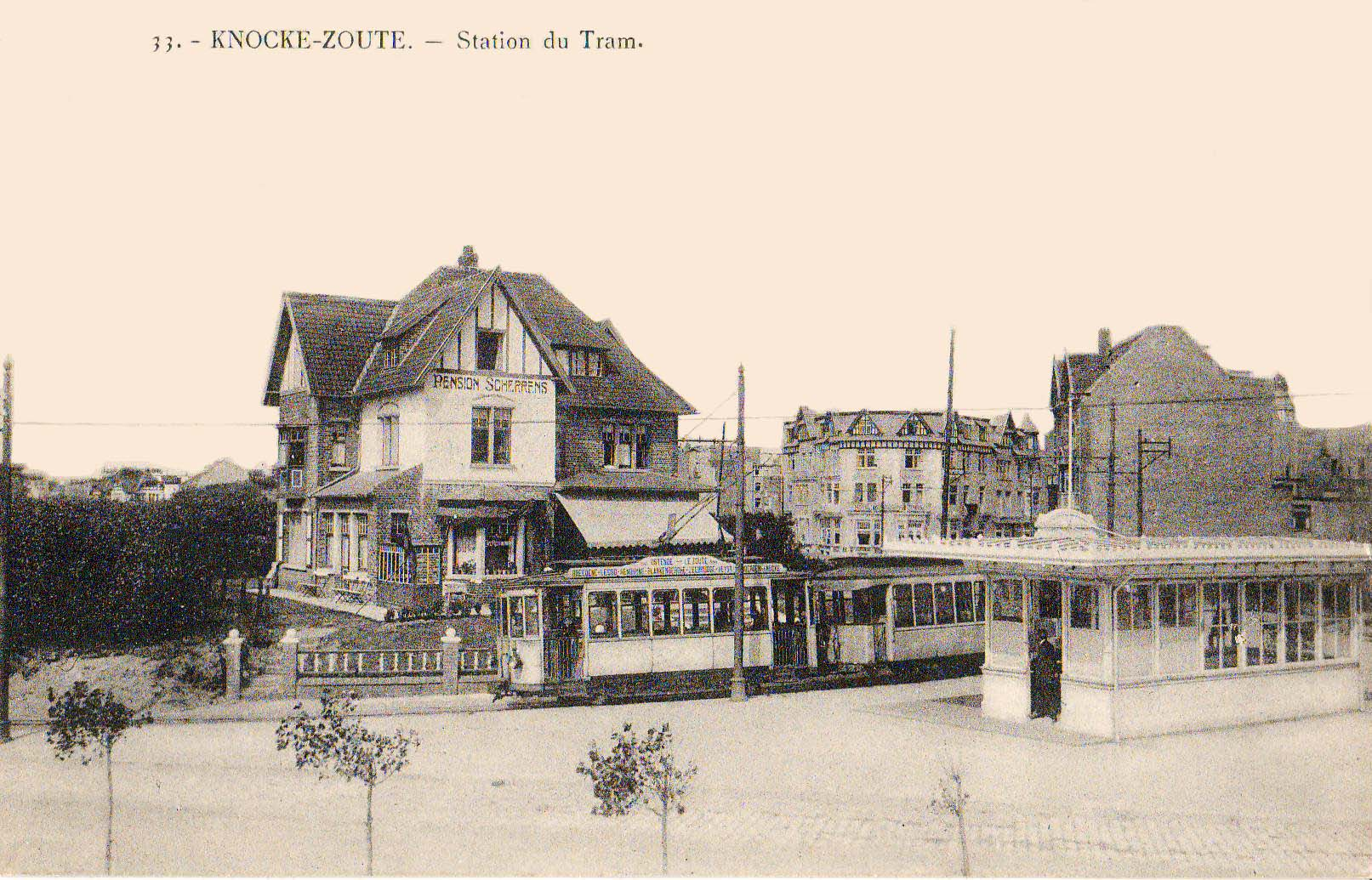 Carte postale ancienne éditée par Henri Georges, éditeur à Bruxelles N°33KNOCKE-ZOUTE - Station du Tram